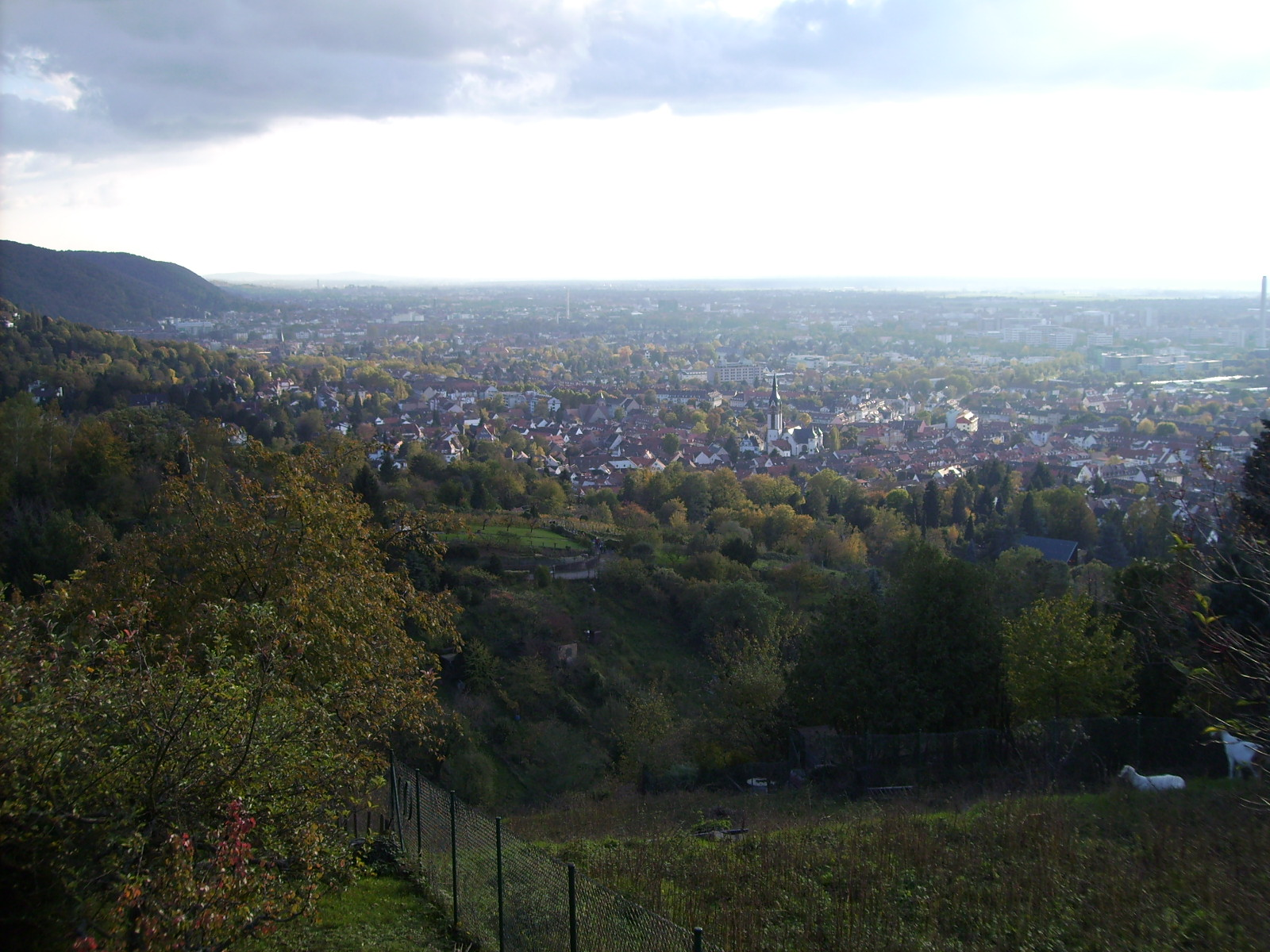 View of Handschuhsheim, Heidelberg, Germany